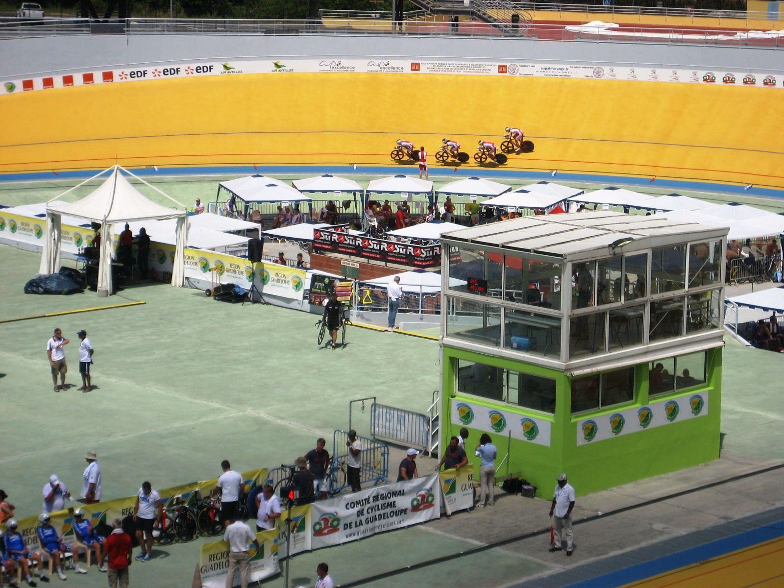 Vélodrome Amédée Detraux in Baie-Mahault auf Guadeloupe (Französische Antillen)